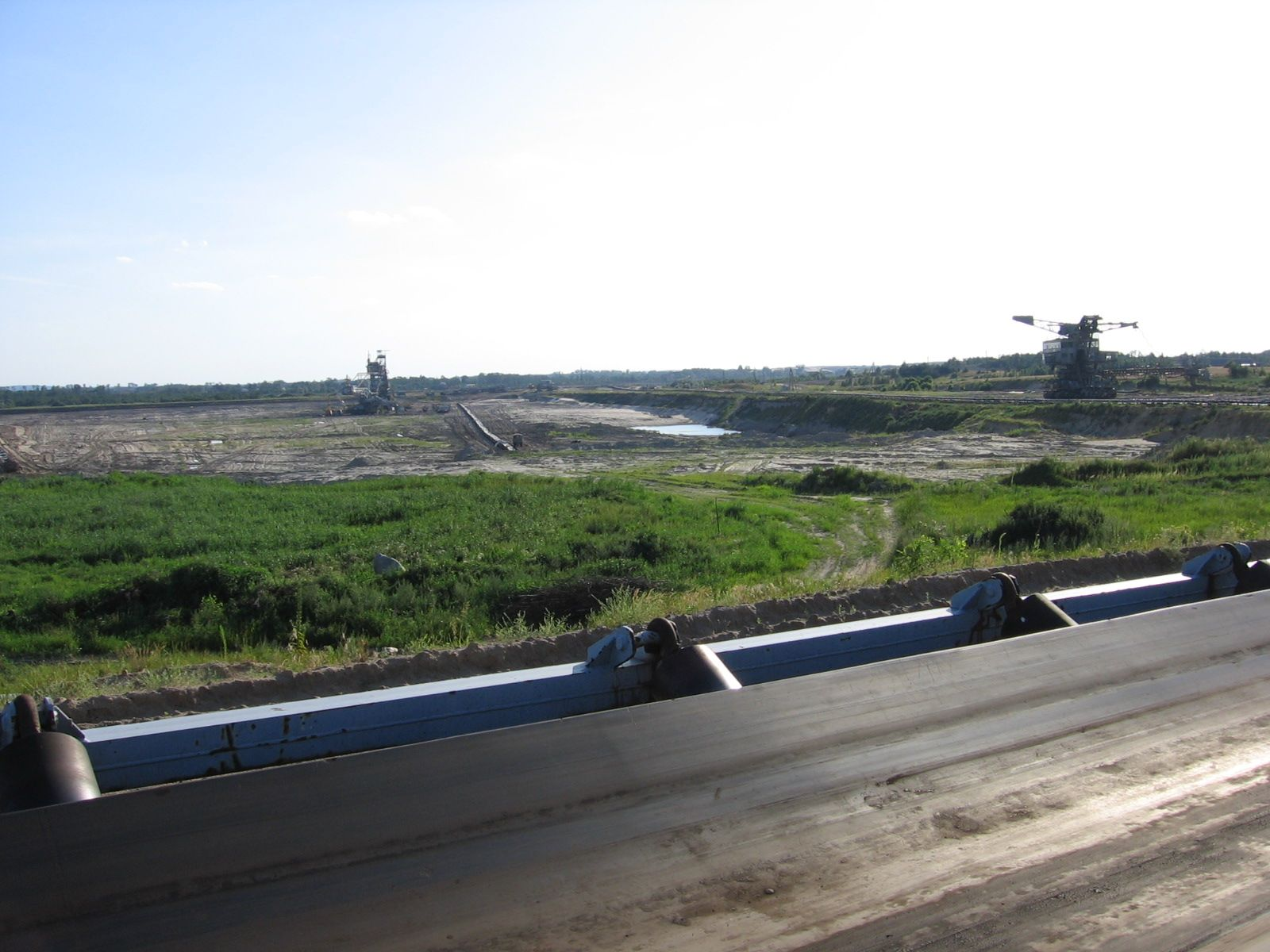 odkrywka Drzewce lipiec 2009 rok